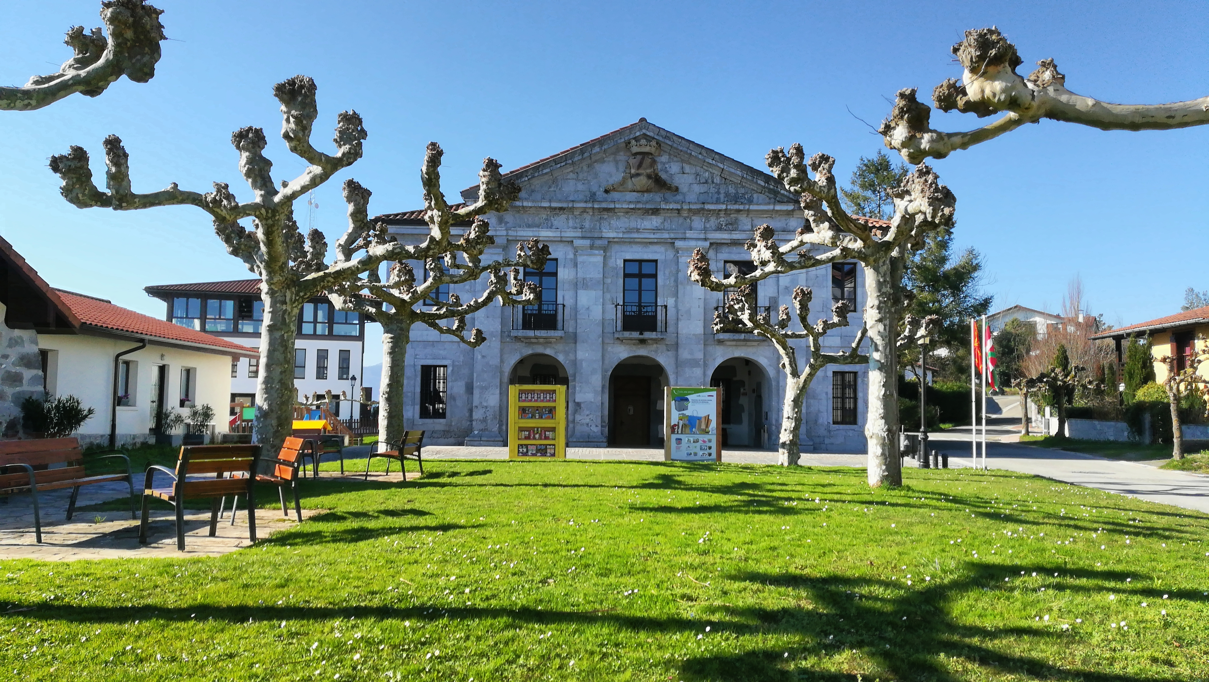 Ayuntamiento de Orendain